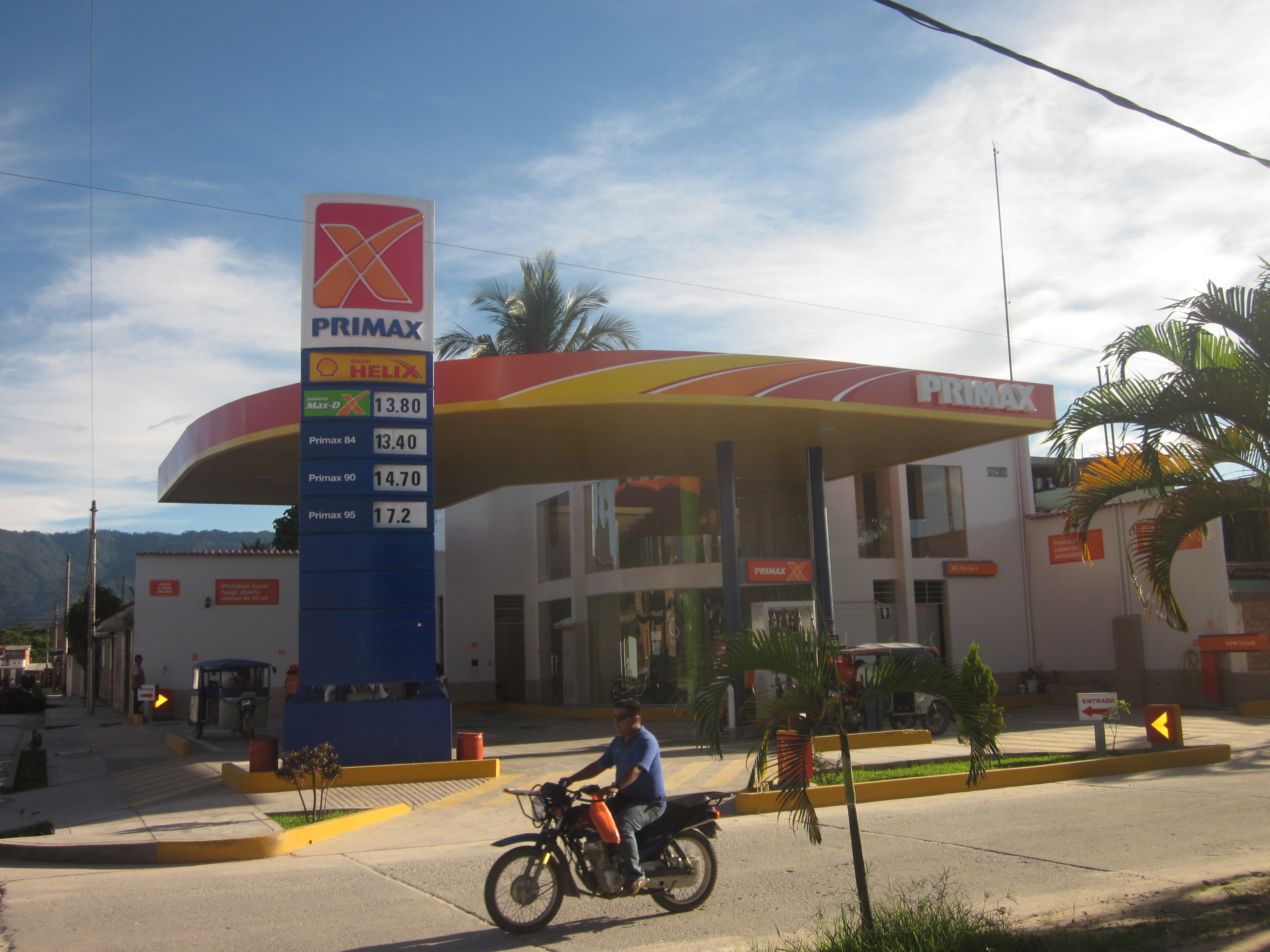 Estacion de Servicio Primax en Moyobamba